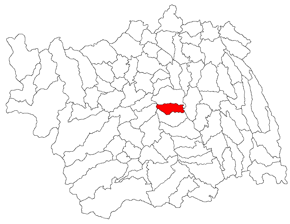 Categorie:Hărţi ale judeţului Bacău